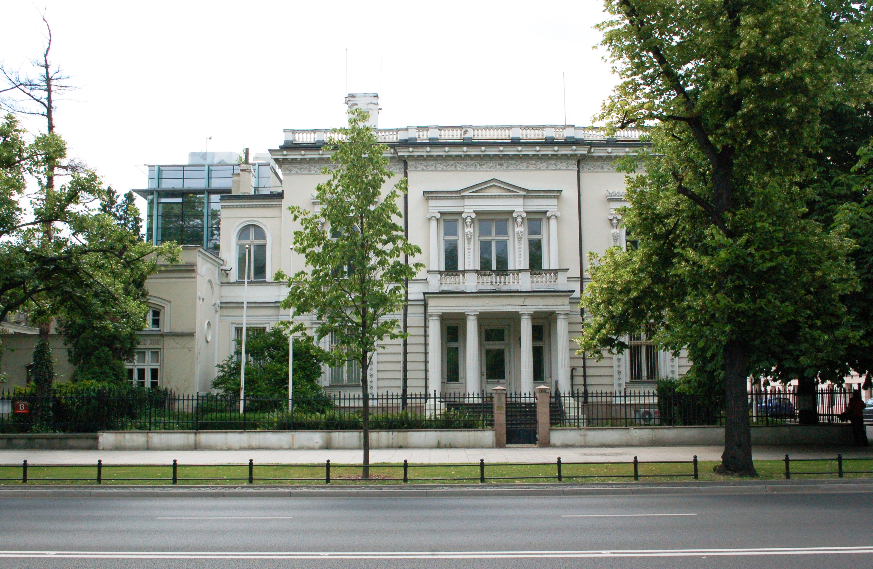 Warschau